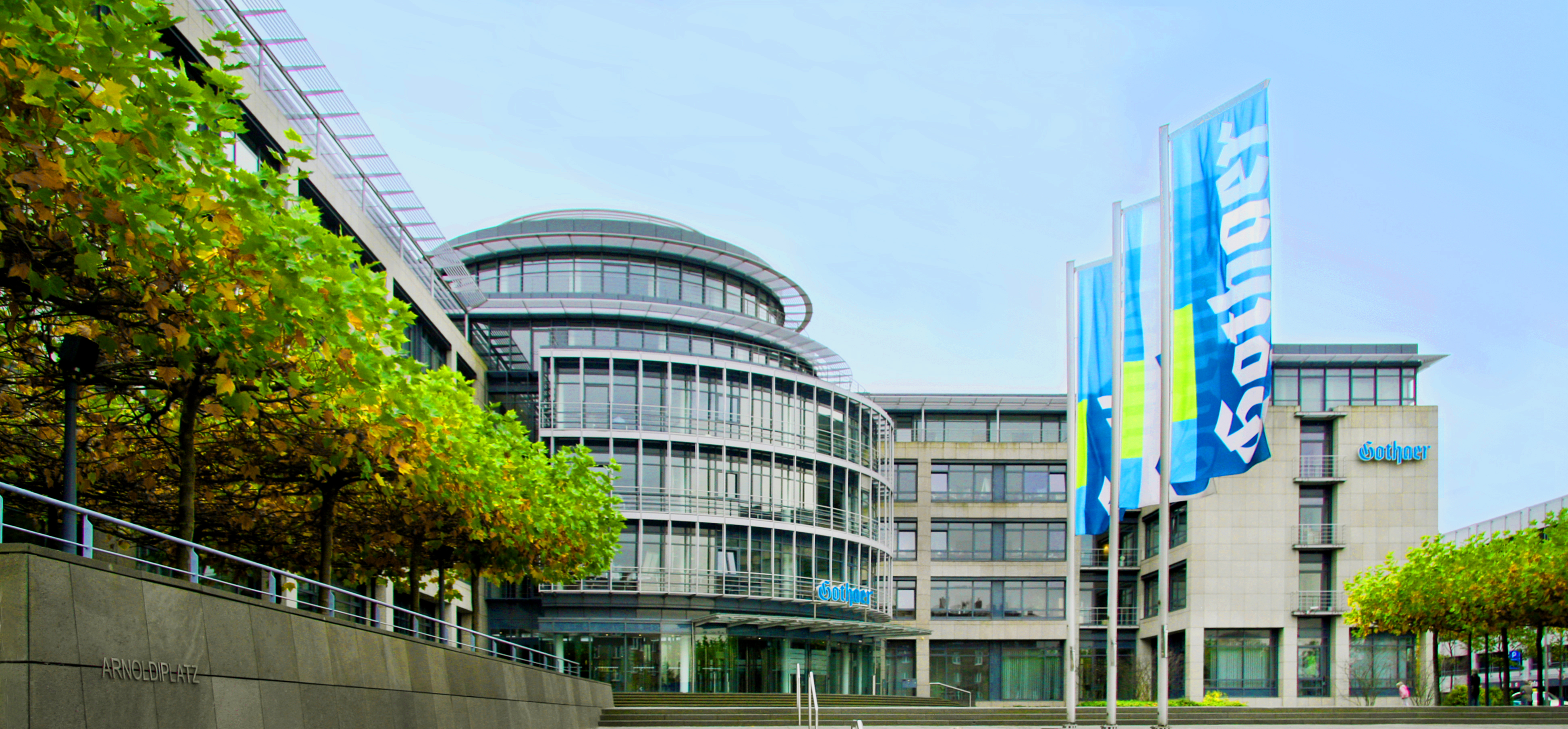 Gothaer Konzernzentrale am Arnoldiplatz in Köln